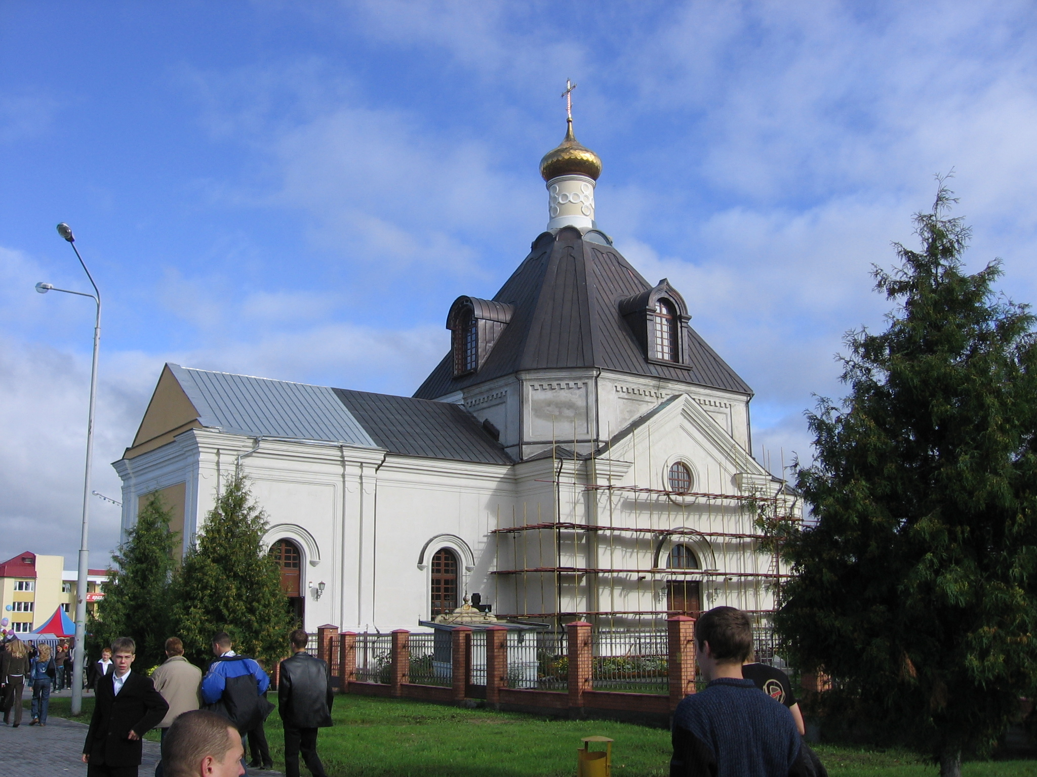 Речица в 2006 году